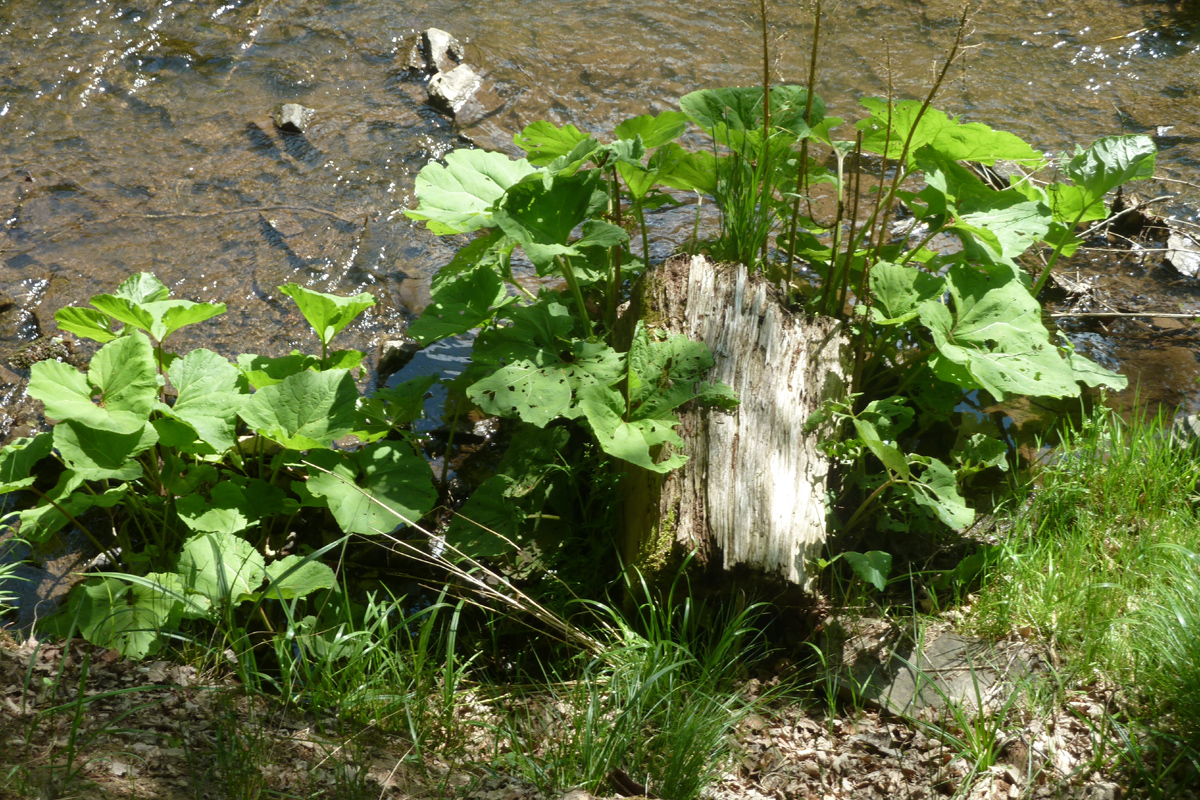 Pflanzen am Armuthsbach in der Nähe von Pitscheid (Hümmel) und Wershofen, Landkreis Ahrweiler, Rheinland-Pfalz. Der Bach bildet die Gemeindegrenze.